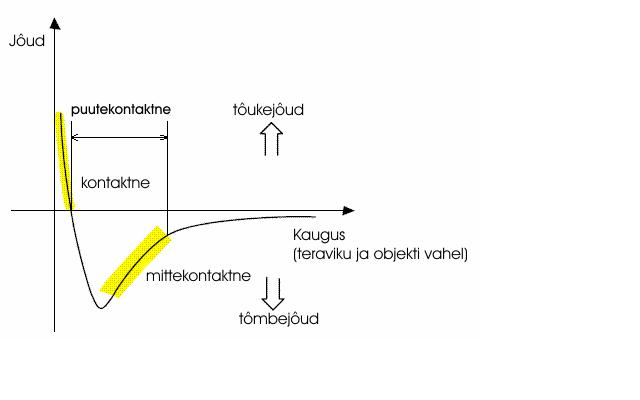 Teraviku ja objekti vaheline interaktsioon